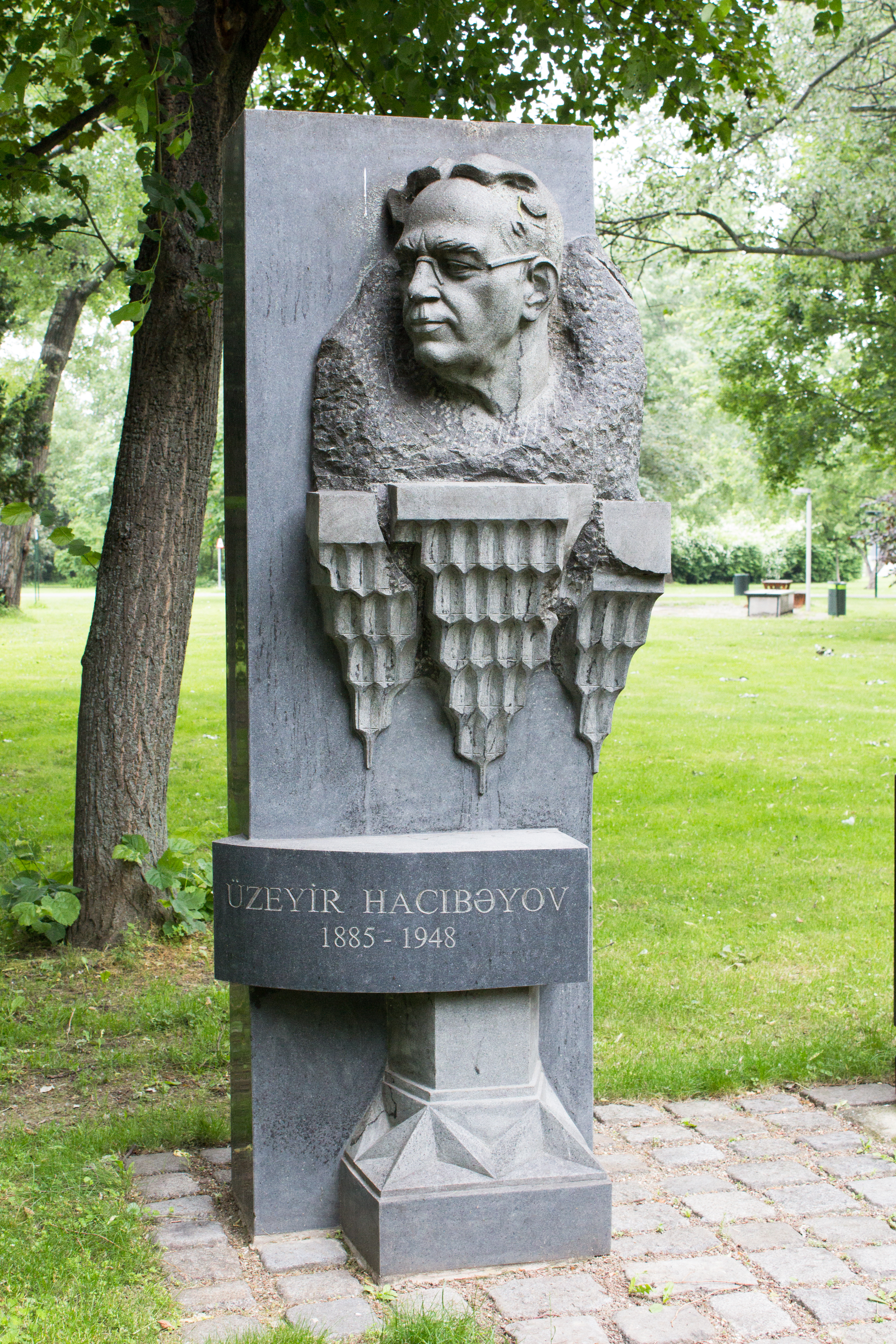 Üzeyir Hacibeyov - Denkmal